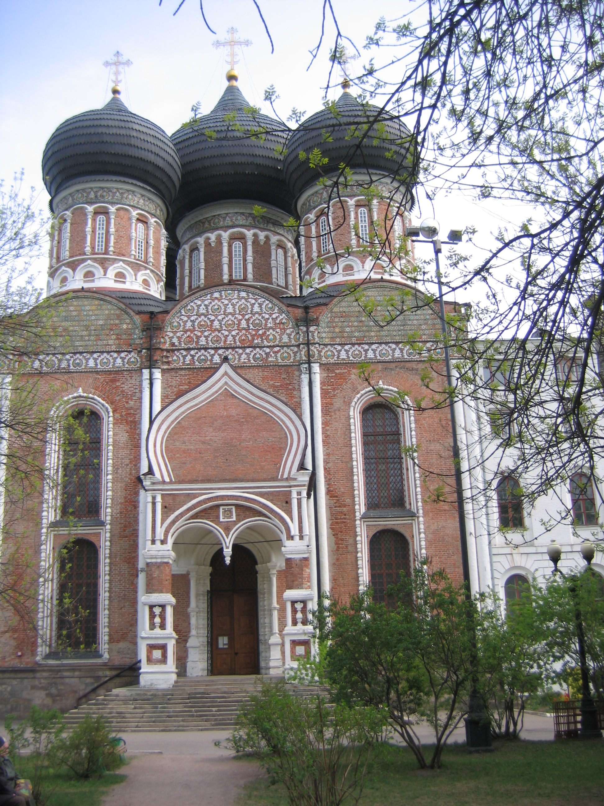 Pokrovsky sobor (Pokrov church) in Izmaylovo, Moscow, Russia